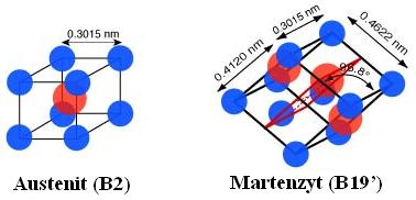 Poglądowa struktura martenzytu i austenitu NiTi.